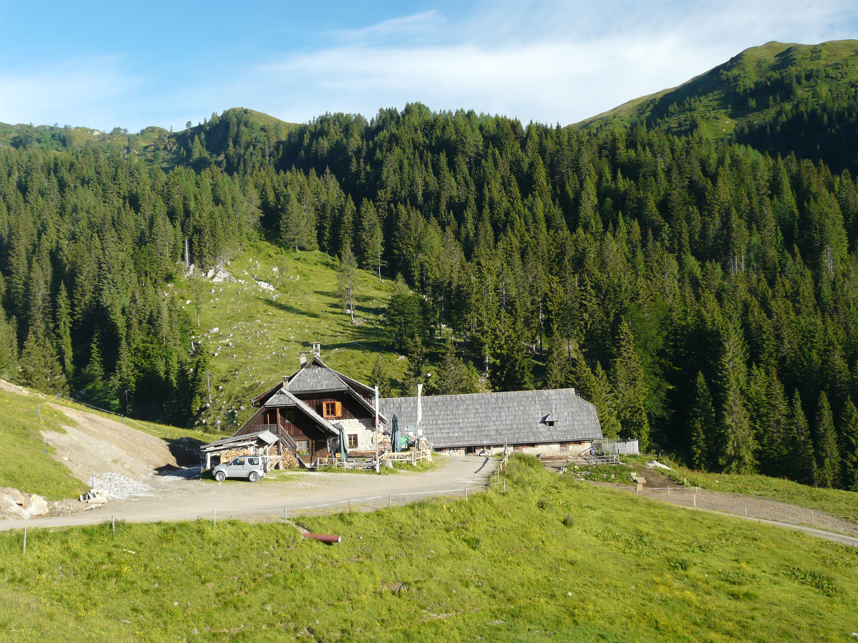 Die Straniger Alm in den Karnischen Alpen, gelegen auf 1479 Metern Höhe.